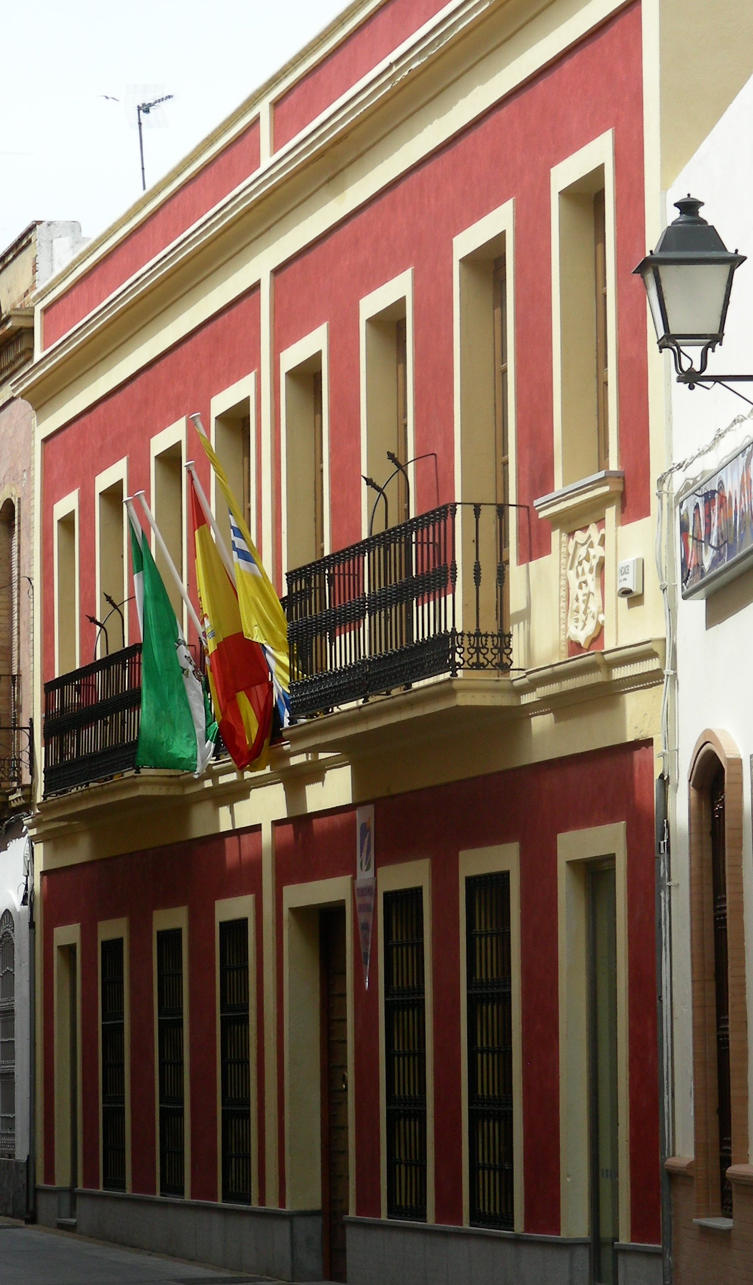 museo del carnaval y centro de atención turística de Isla Cristina